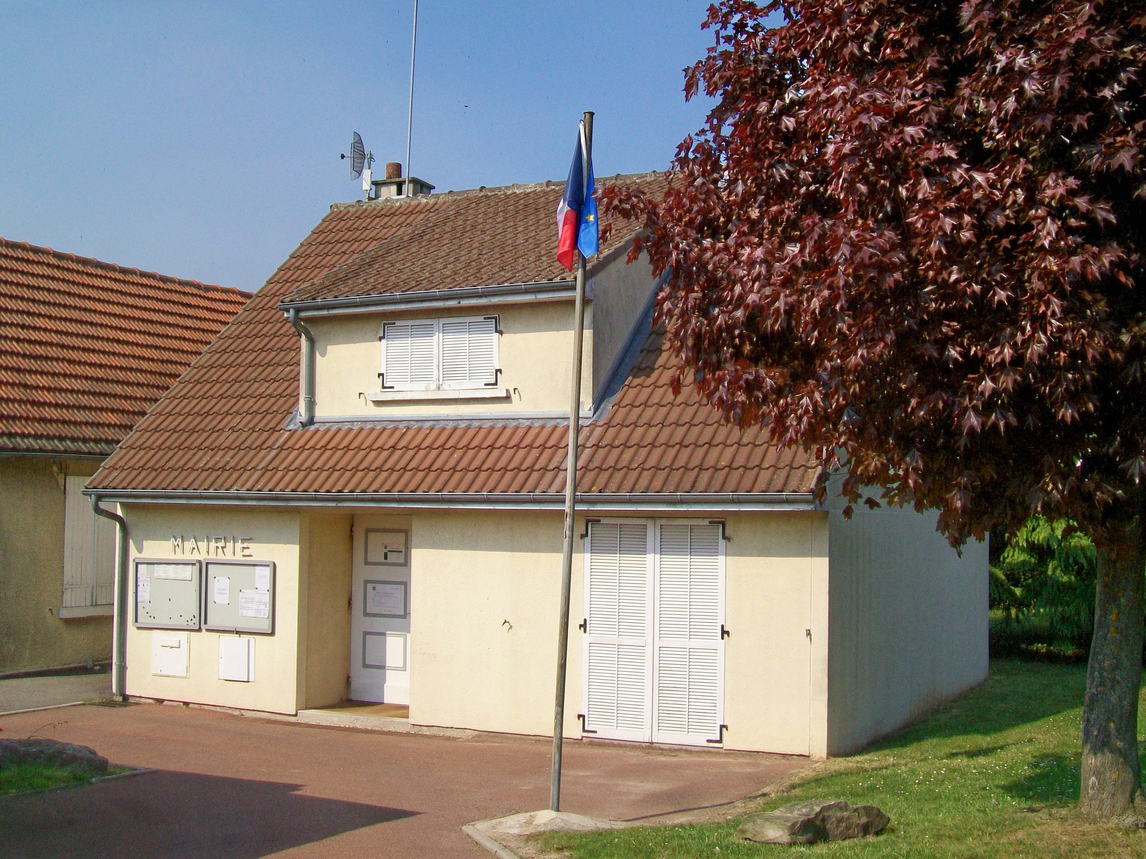 La nouvelle mairie de Saint-Witz de 1972, agrandie ultérieurement par un deuxième pavillon partiellement visible à gauche.